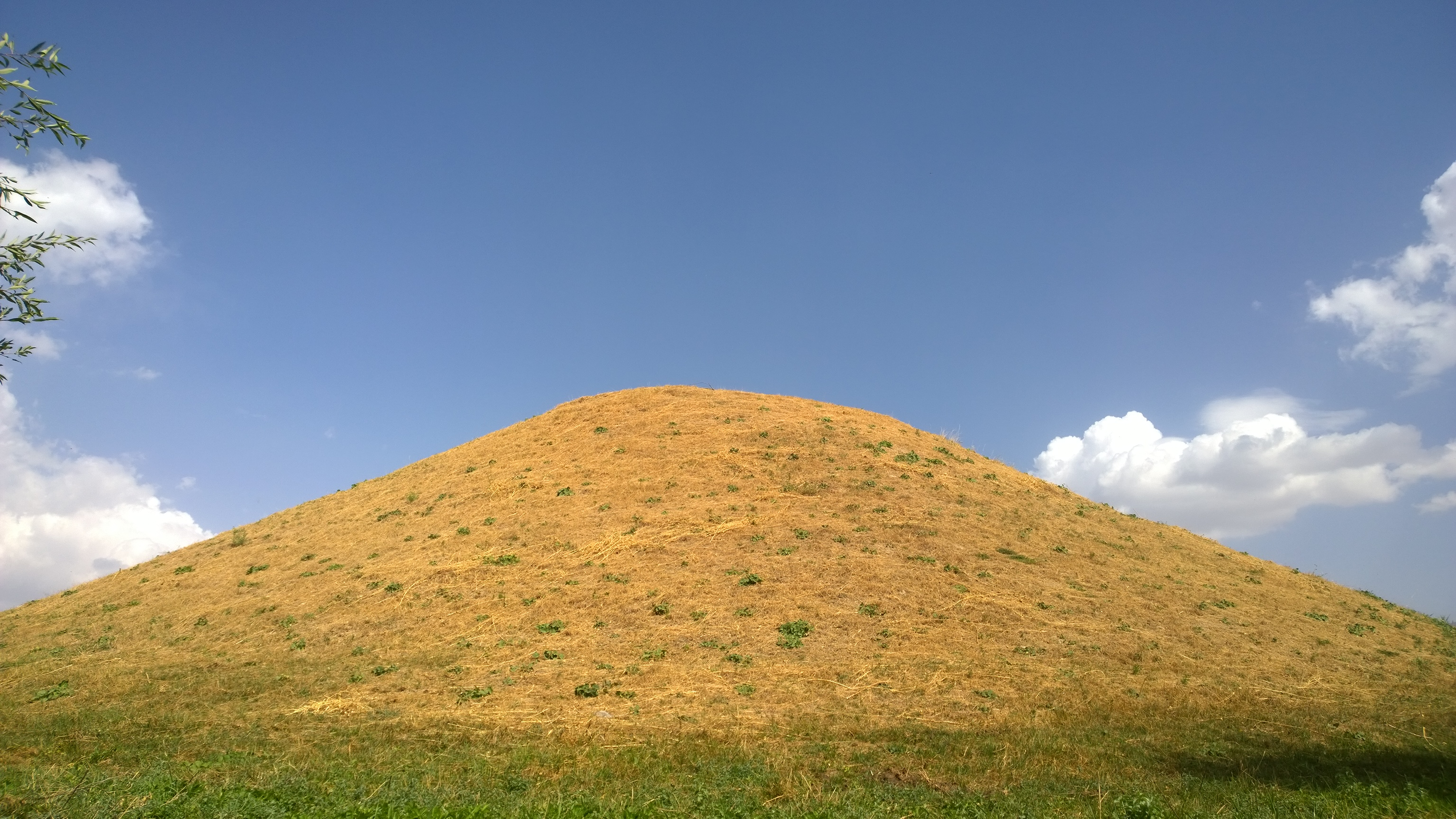 Тоҷикӣ: Доробқалъа аз самти ғарб (деҳаи Дороб, н. Файзобод)